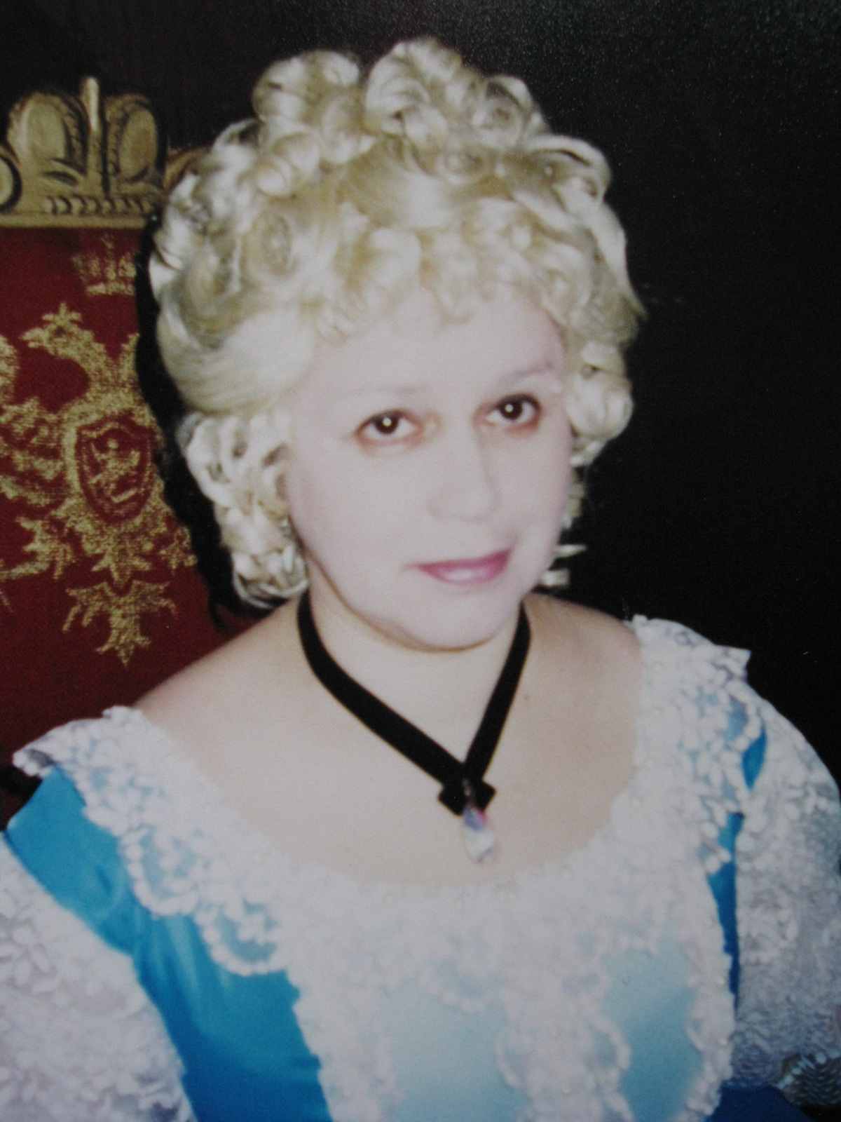 Татьяна Кудрявцева в роли Анны Монс. Спектакль "Любовь и смерть. Смерть и любовь" Санкт-Петербургского драматического театра «Патриот» РОСТО. Режиссёр-постановщик Геннадий Егоров.